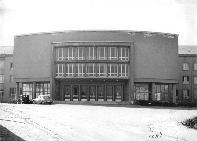 Freiberg, Bergakademie, Clemens-Winkler-Bau Zentralbild Schlegel 16.4.1956 Zi-Th. Zum VIII. Berg- und Hüttenmännischen Tag vom 24. bis 26.5.1956 in Freiberg. Bis jetzt stellte die Regierung für den Neubau der Bergakademie in Freiberg etwa 10 Mill. DM zur Verfügung. Im 2. Fünfjahrplan sind zur Erweiterung 50 Mill. eingeplant. Die Zahl der an der Bergakademie studierenden stieg von 250 im Jahre 1945 auf etwa 2000 im Jahre 1956. Von 1951 bis 1954 wurde das neue Chemische Institut erbaut, wofür die Regierung 7 025.000 DM ausgab. Es ist nach dem bekannten Wissenschaftler "Clemens Winkler" benannt worden. UBz: Außenansicht des Mittelteils des großen Baues.